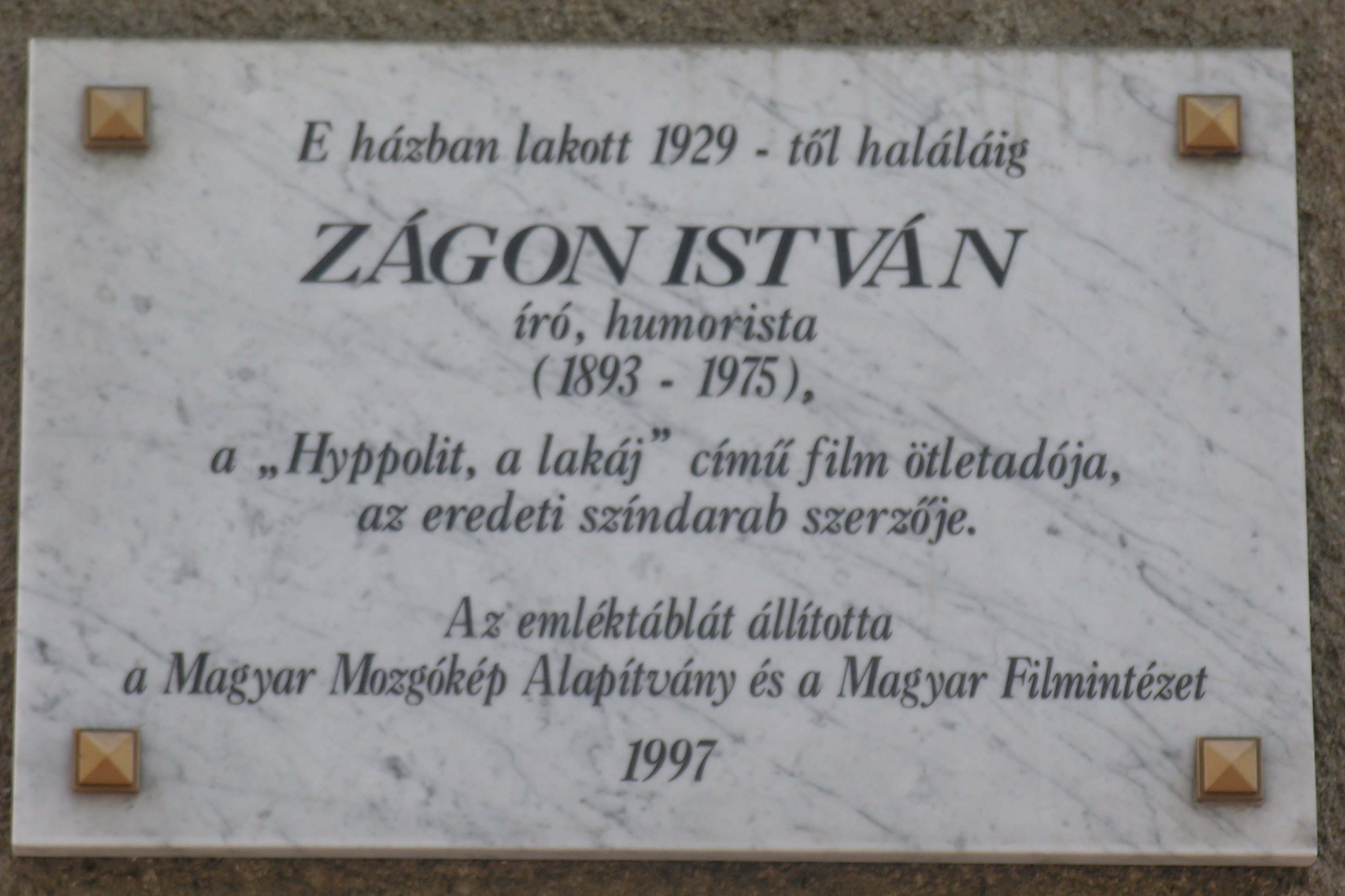 Zágon István emléktáblája, Budapest II., Bimbó út 3.